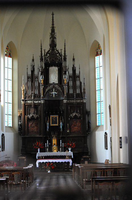 Костел Успення Пресвятої Богородиці